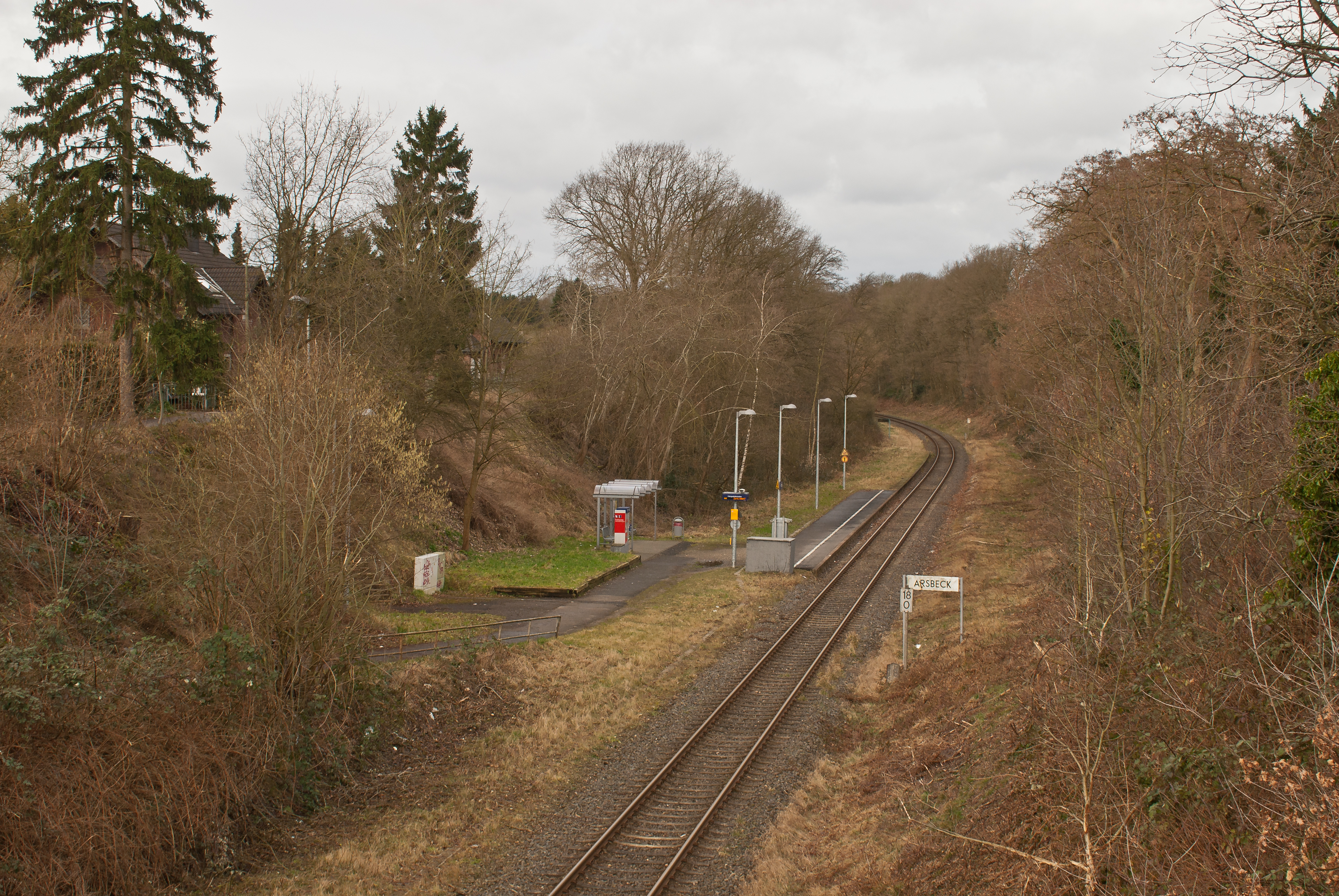 Der Haltepunkt Arsbeck an der Bahnstrecke Rheydt - Dalheim ("Eiserner Rhein")